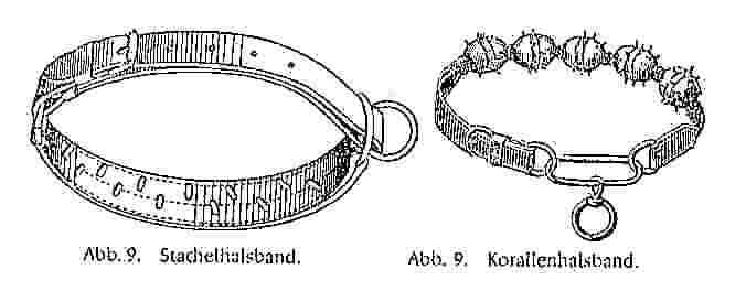 Erziehungshalsung für den Hund